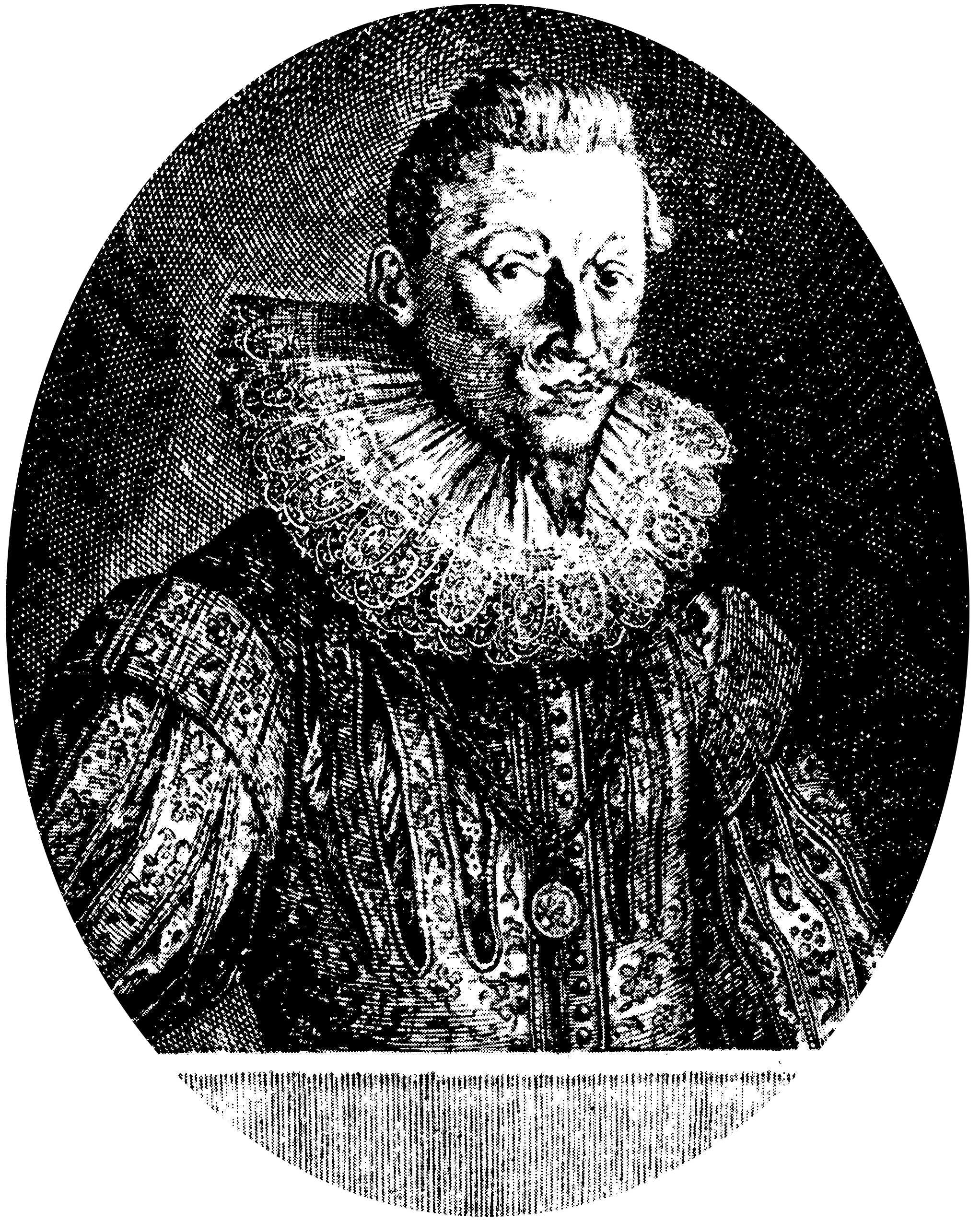 Heinrich Schütz – Kurfürstlich sächsischer Hofkapellmeister im Alter von 42 Jahren nach einem Kupferstich von August John (um 1627/28) Source: Ratsschulbibliothek Zwickau